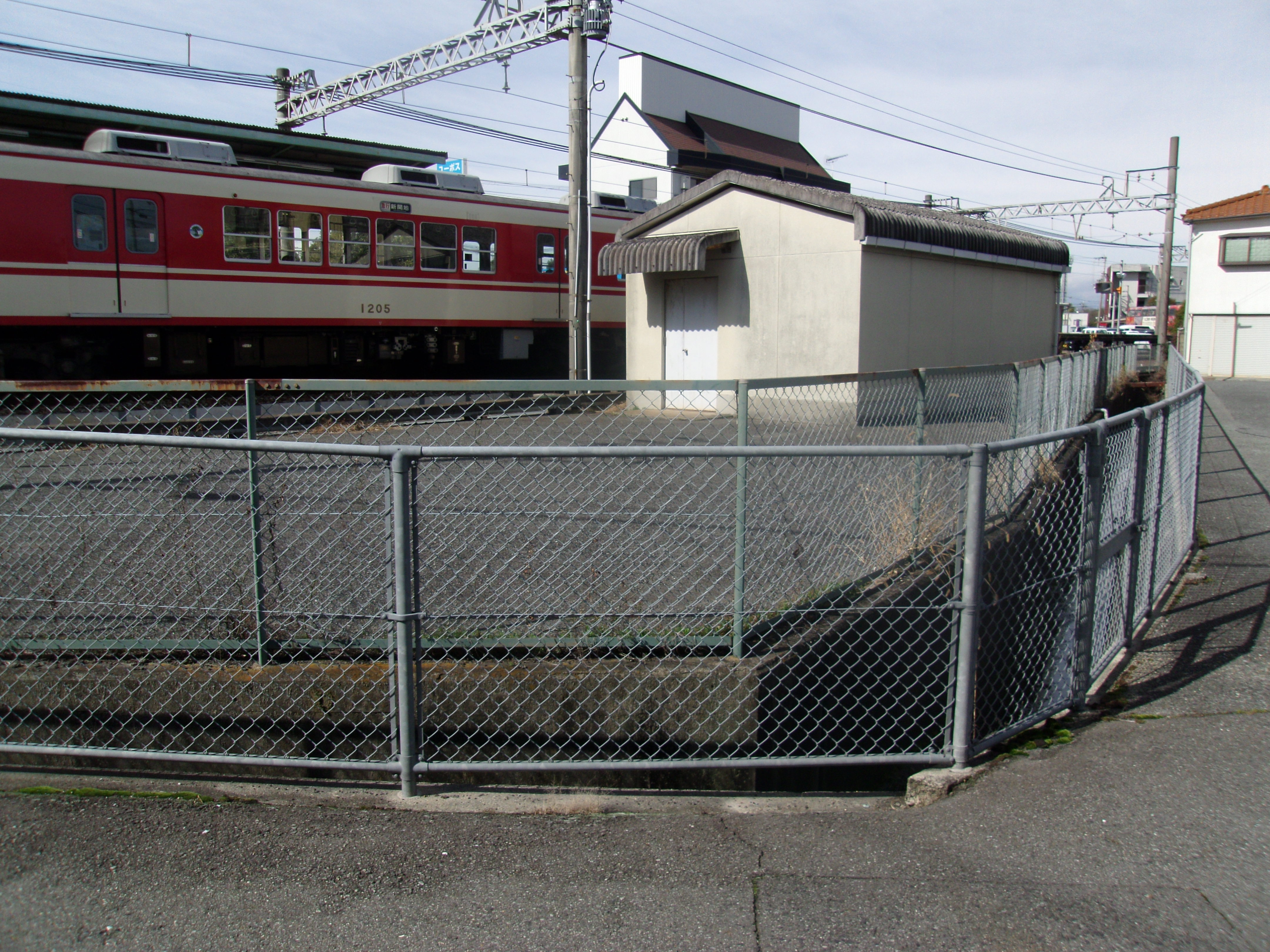 広野ゴルフ場前駅脇を流れる淡河疎水の別所・相野支線